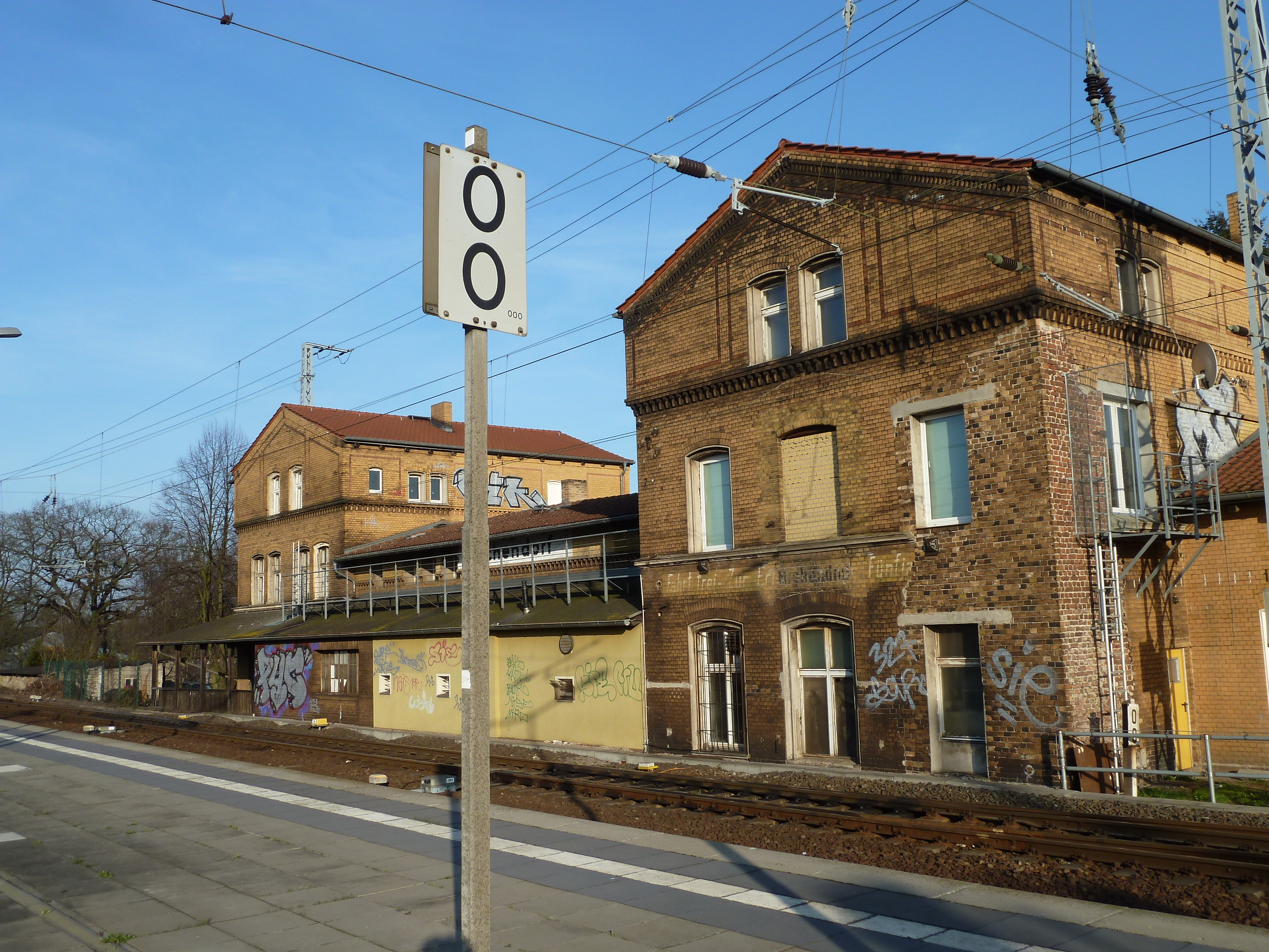 Bahnhof Michendorf, Bahnsteigseite